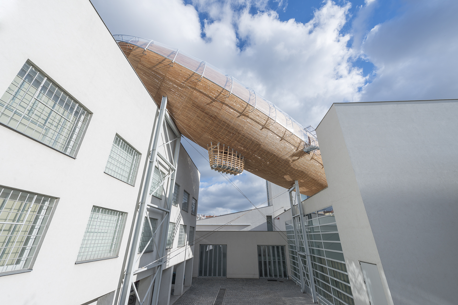 Vzducholoď Gulliver z nádvoří DOX Praha, 2016, foto Jan Slavík